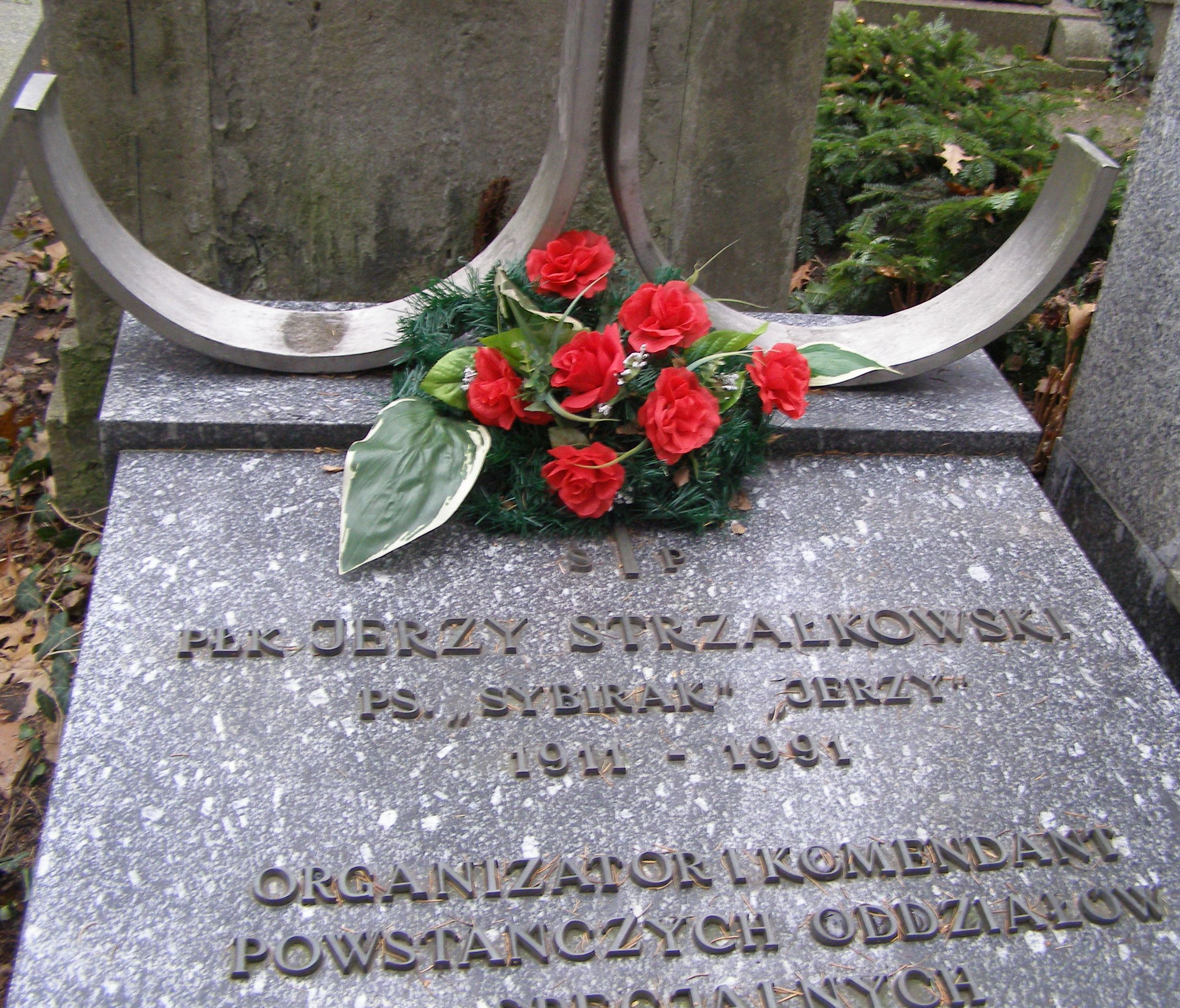 wykonana własnoręcznie własnoręczna fotografia